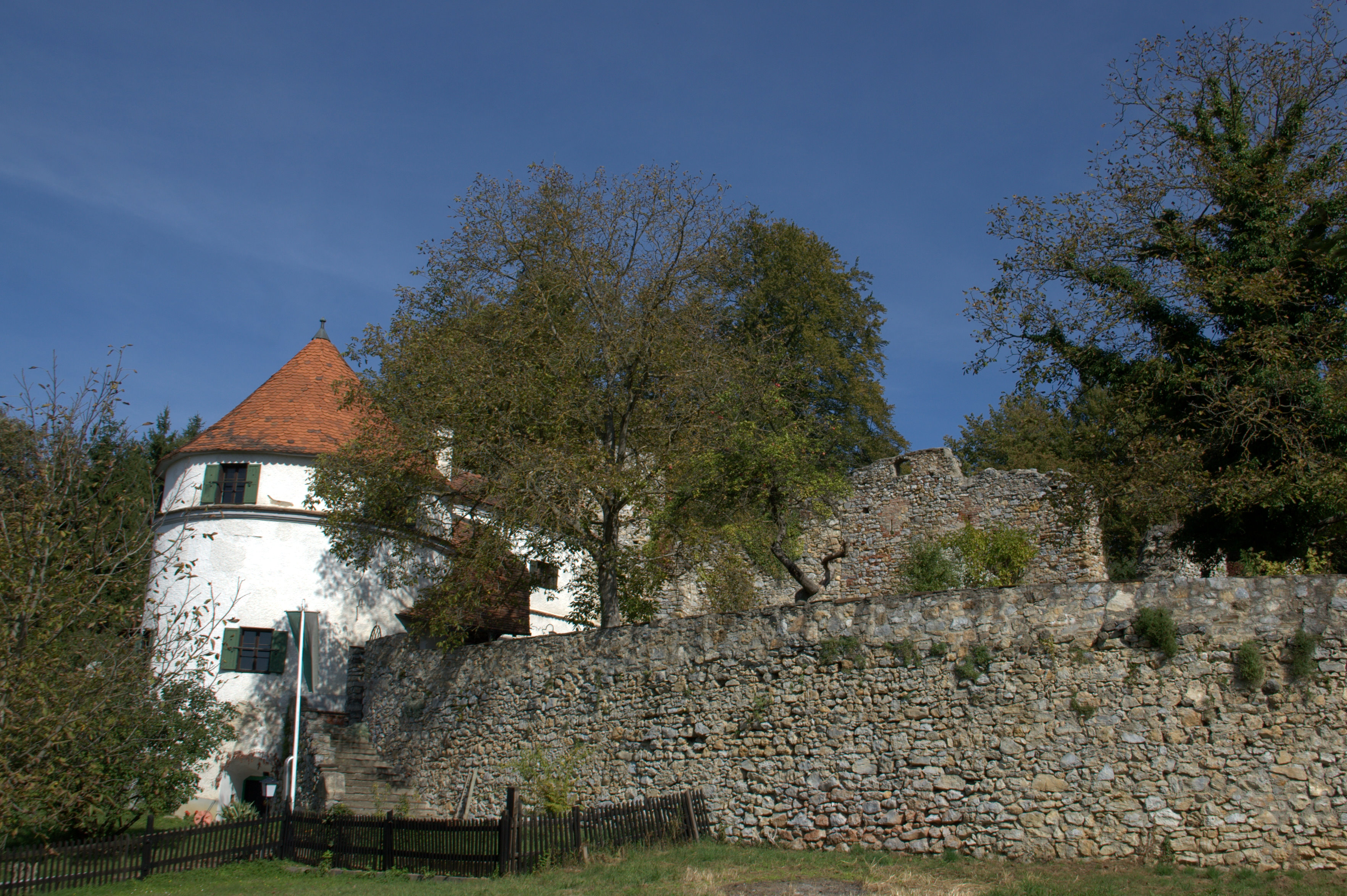 Burgruine Thalberg (Unterthal)